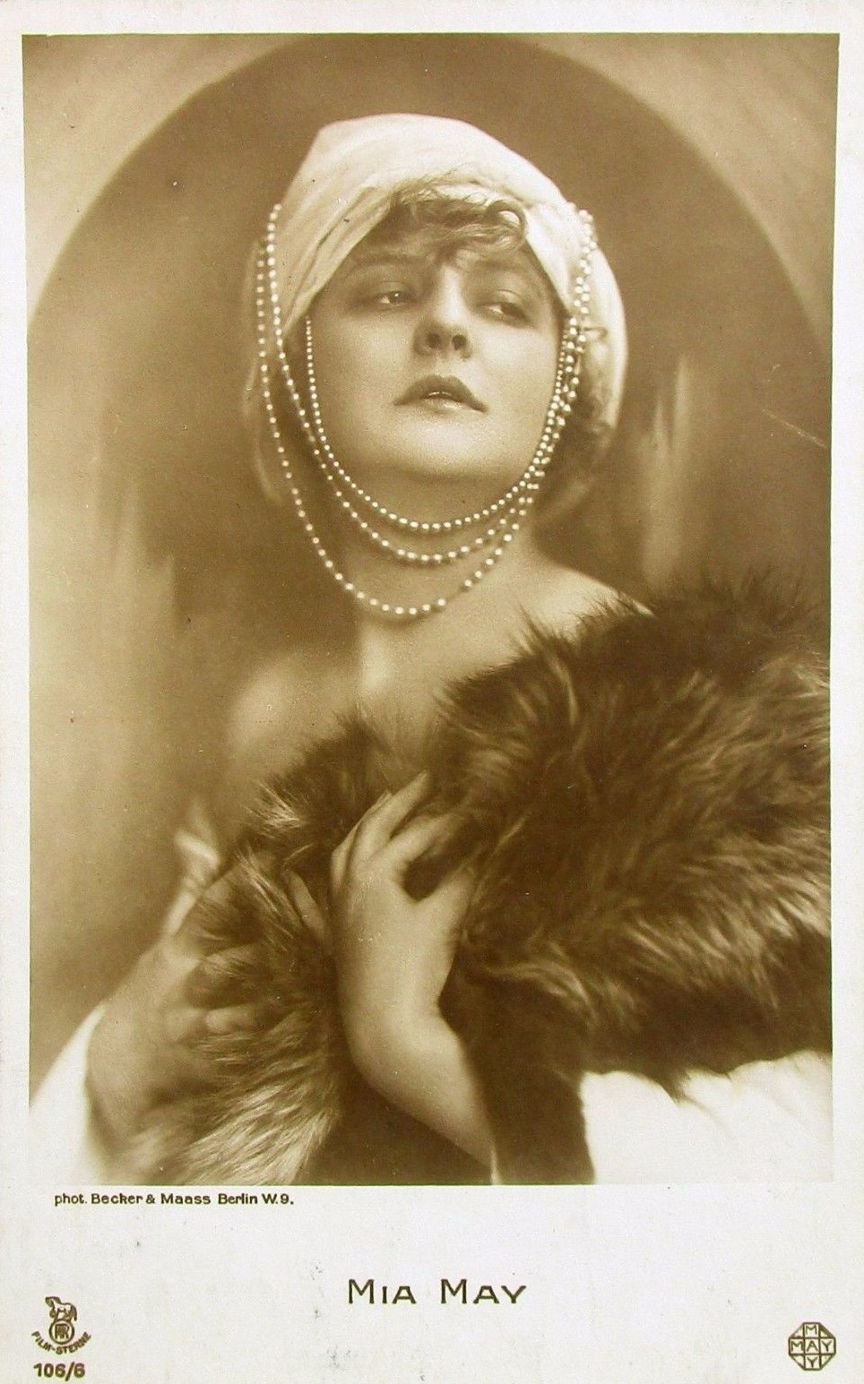 Mia May. Photopostkarte des Ateliers (Otto) Becker & (Heinrich) Maass. Film-Sterne 106/6